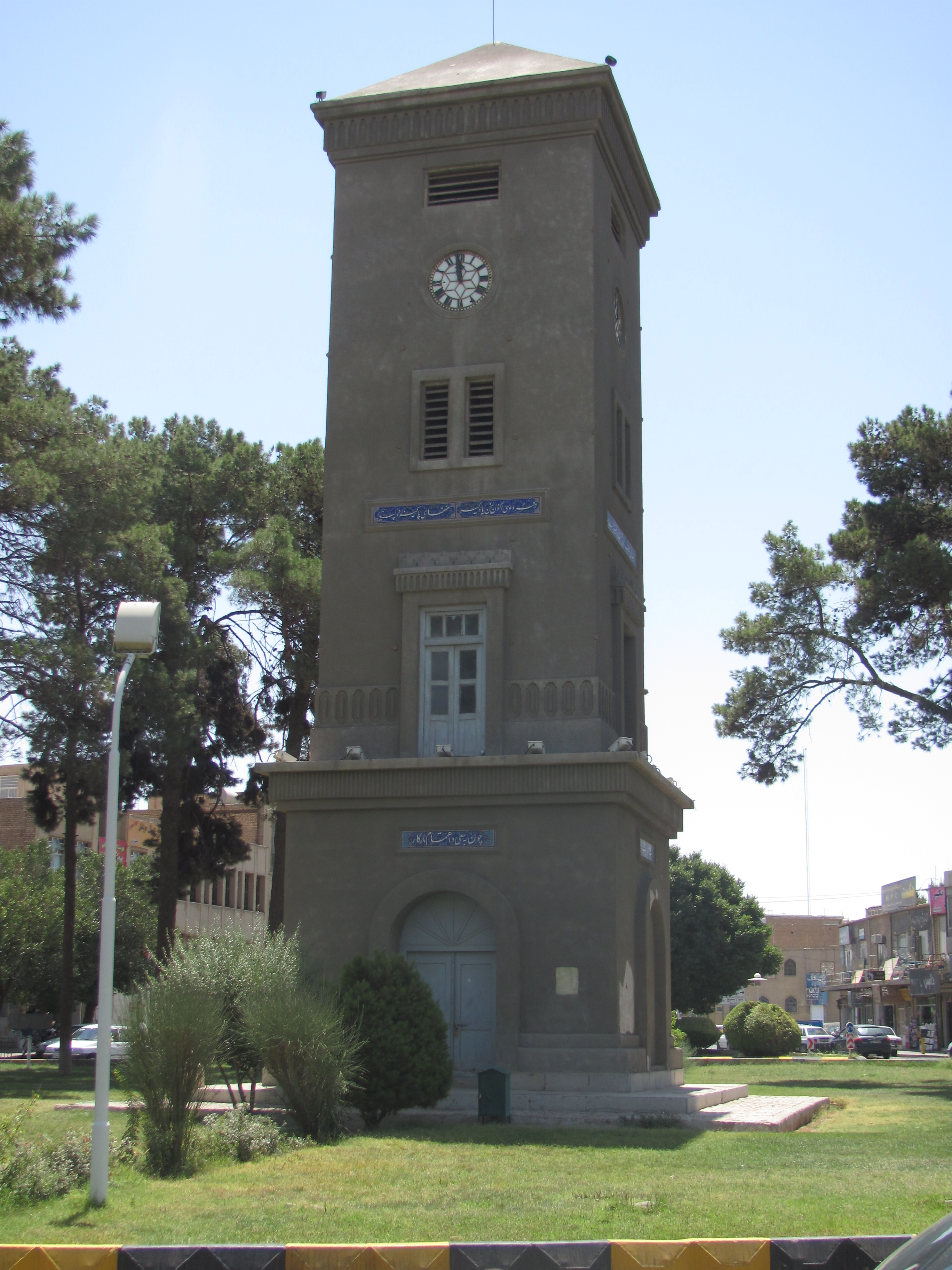 برج ساعت فردوسی(مارکار) وسط ایران